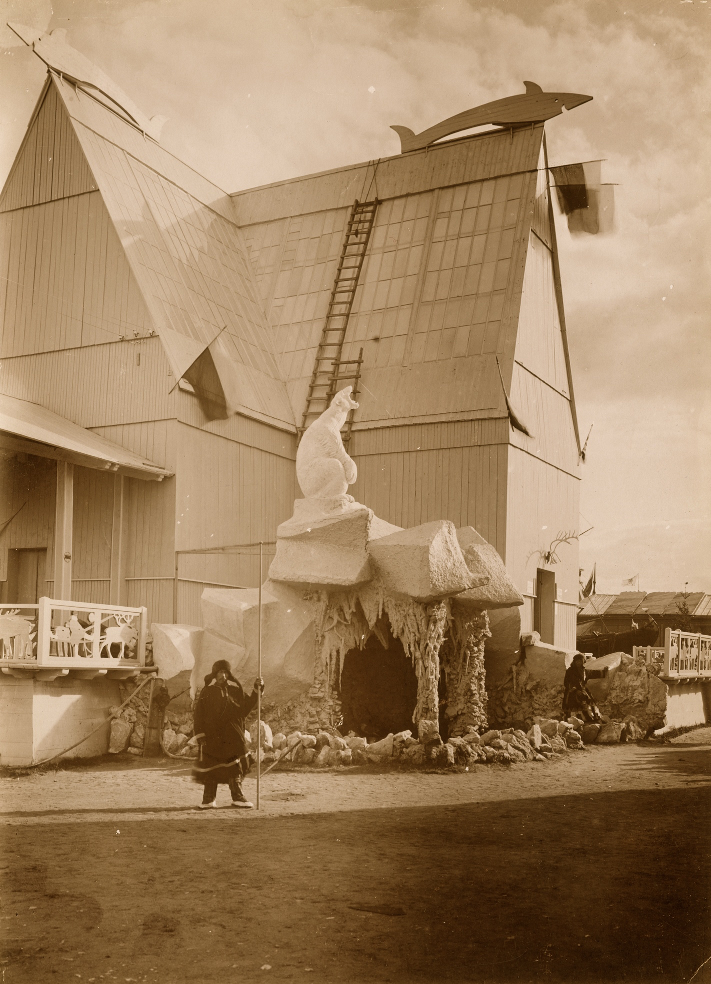 К. А. Коровин, Л. Н. Кекушев. Павильон Крайнего Севера XVI Всероссийская промышленная и художественная выставка в Нижнем Новгороде, 1896 г. Фото М. П. Дмитриева, 1896 г. Из собрания Государственного музея архитектуры имени А.В. Щусева